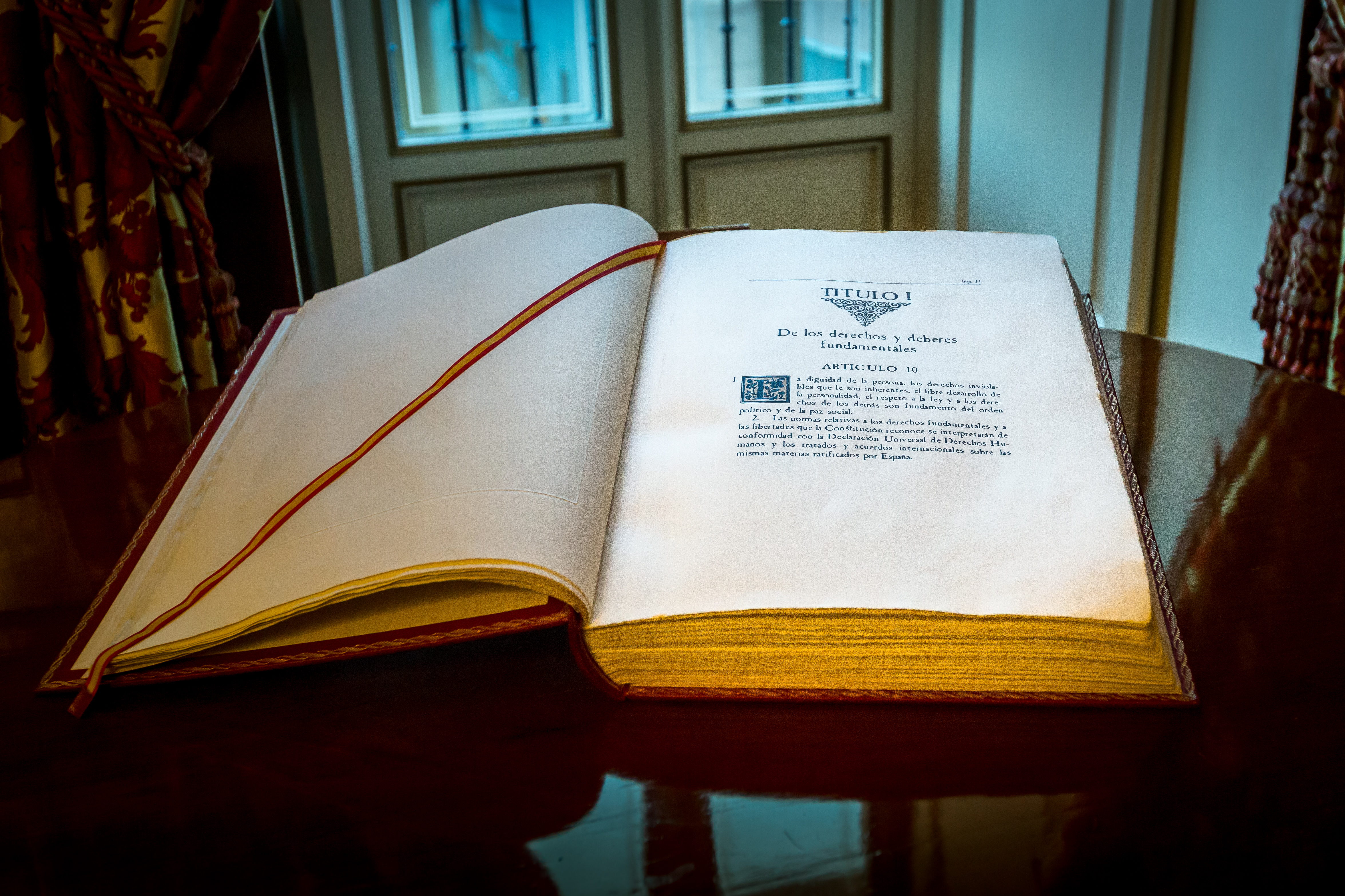 Ejemplar de la Constitución Española de 1978 expuesto en el interior del Palacio del Senado de España, (Madrid). Sobre ella juran actualmente los miembros de esta institución.